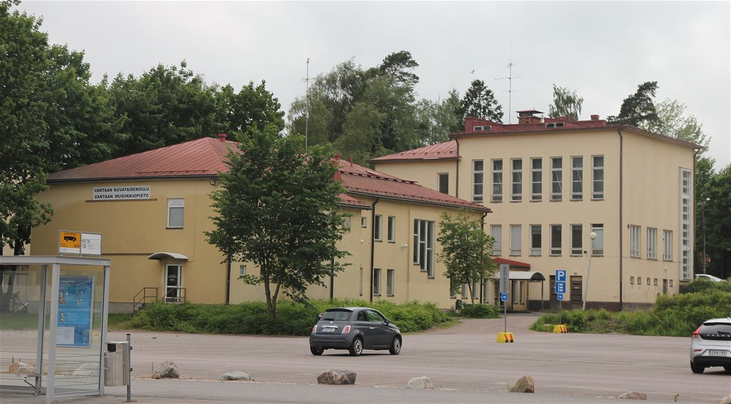 Vantaan kuvataidekoulu ja lasten Kulttuurikeskus Orvokki toimivat aiemmin Tikkurilan koululle kuuluneessa rakennuksessa Vantaan Tikkurilassa. Rakennuksen osoite on Orvokkitie 15, 01300 Vantaa.